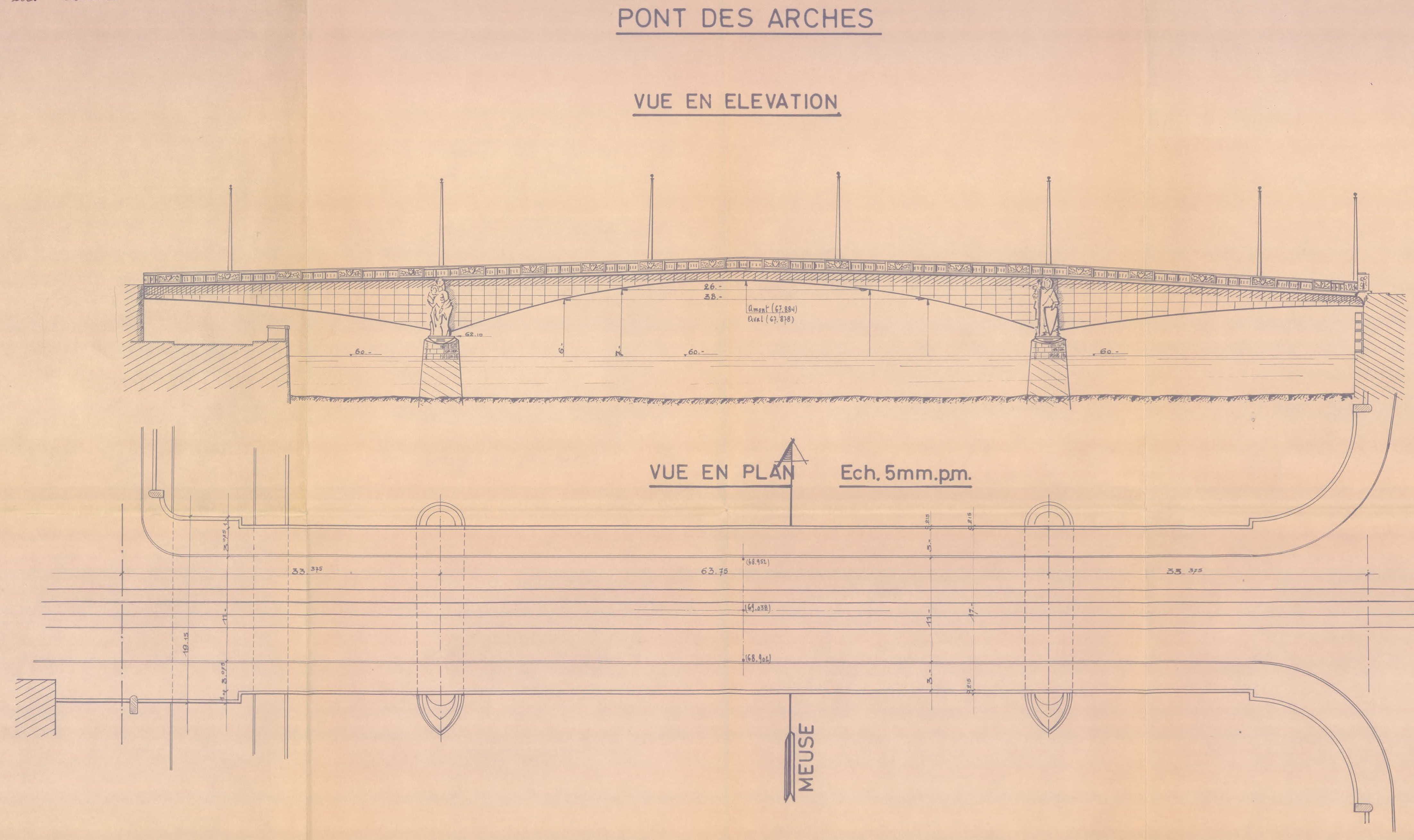 Schéma du Pont des Arches à Liège Vue en élévation Vue en plan